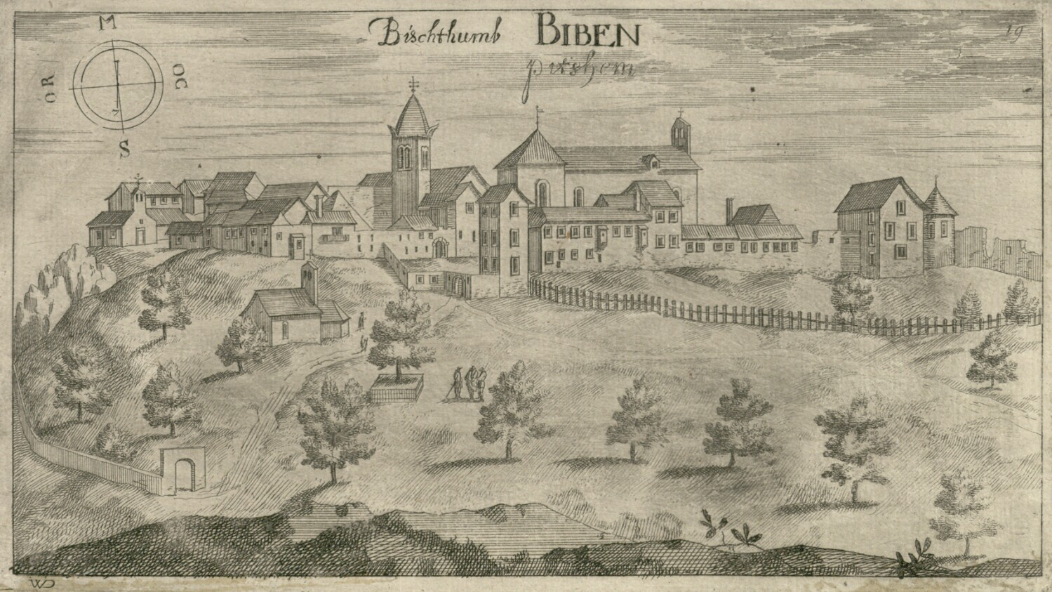 Pićan